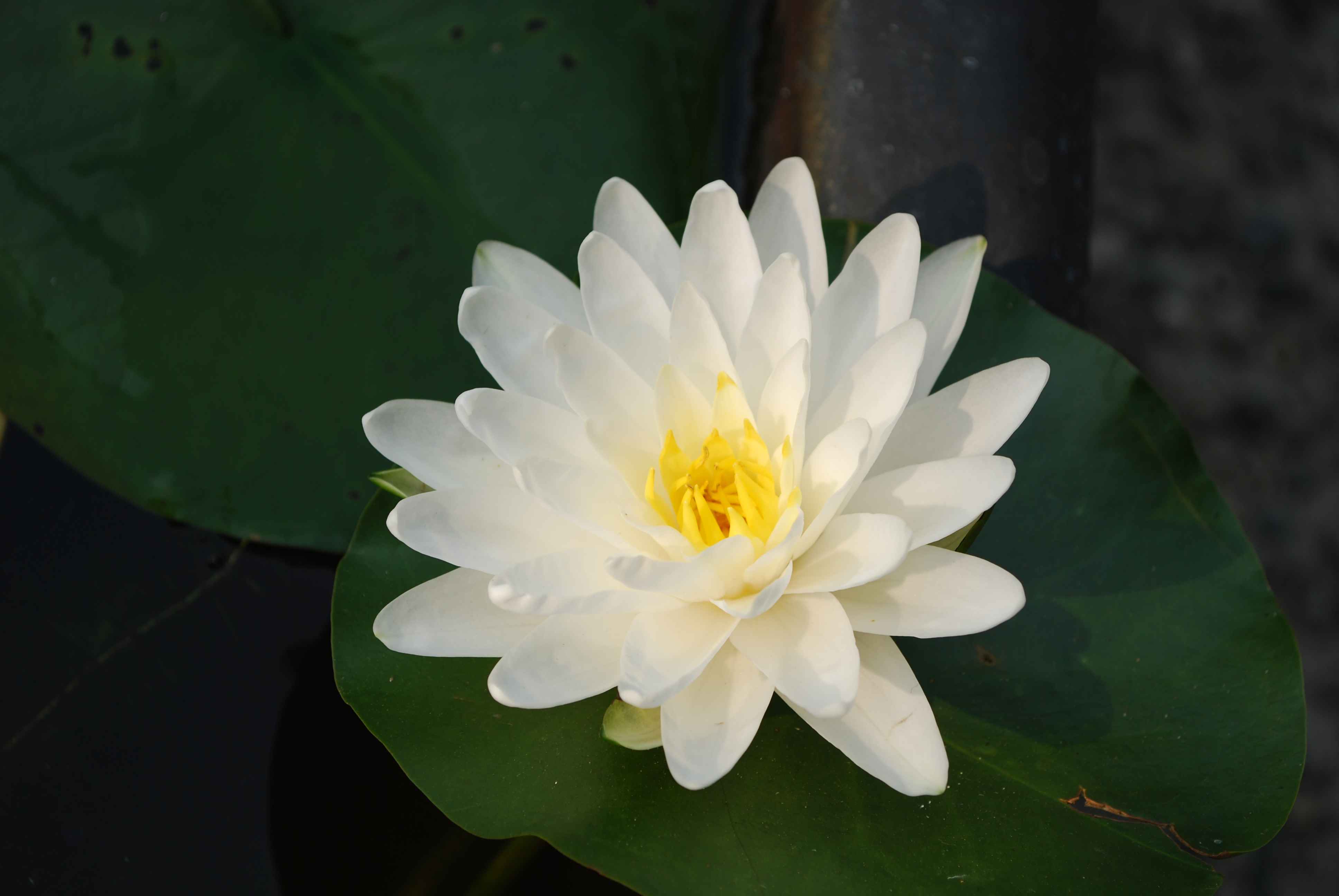 kwiat lotosu English | Polski | +/−